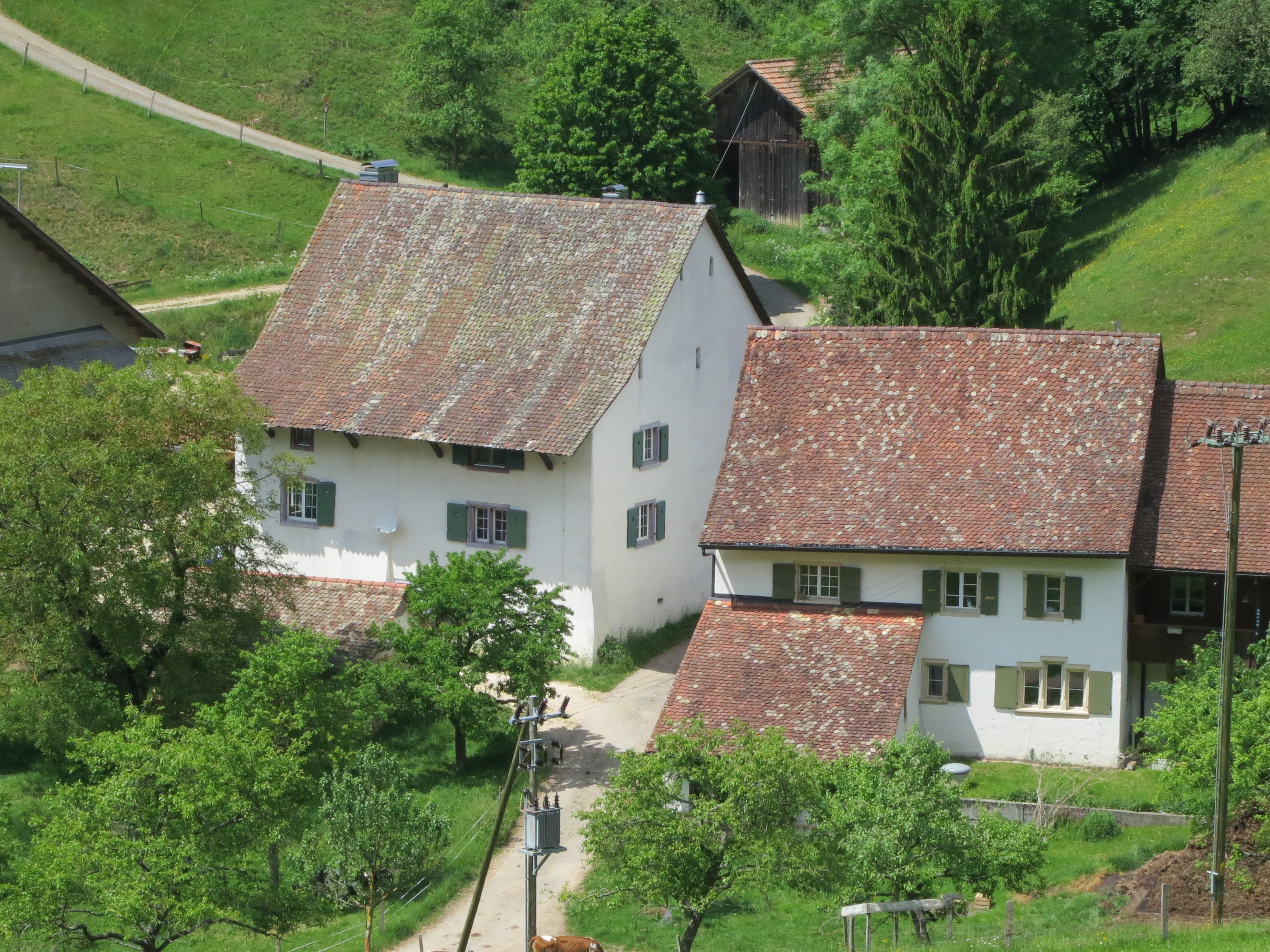 Hofgut Gross-Wald, Langenbruck, Schweiz